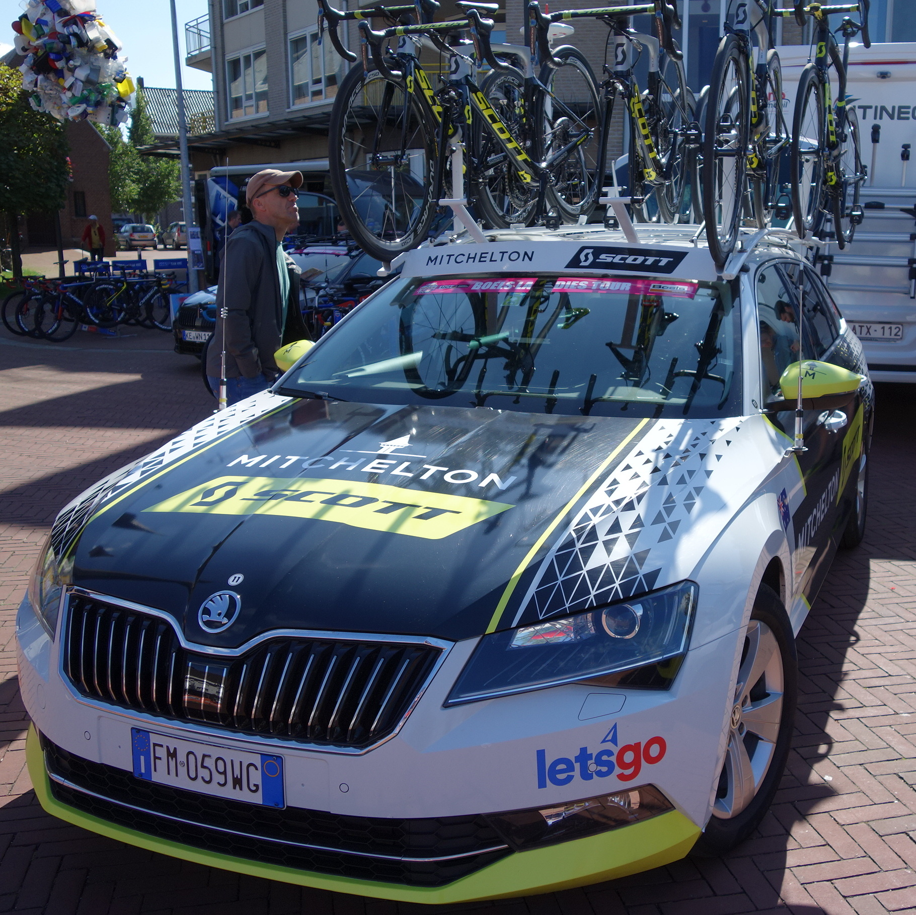 Auto van Mitchelton-Scott bij de start van de eerste etappe van Stramproy naar Weert in de Boels Ladies Tour 2019